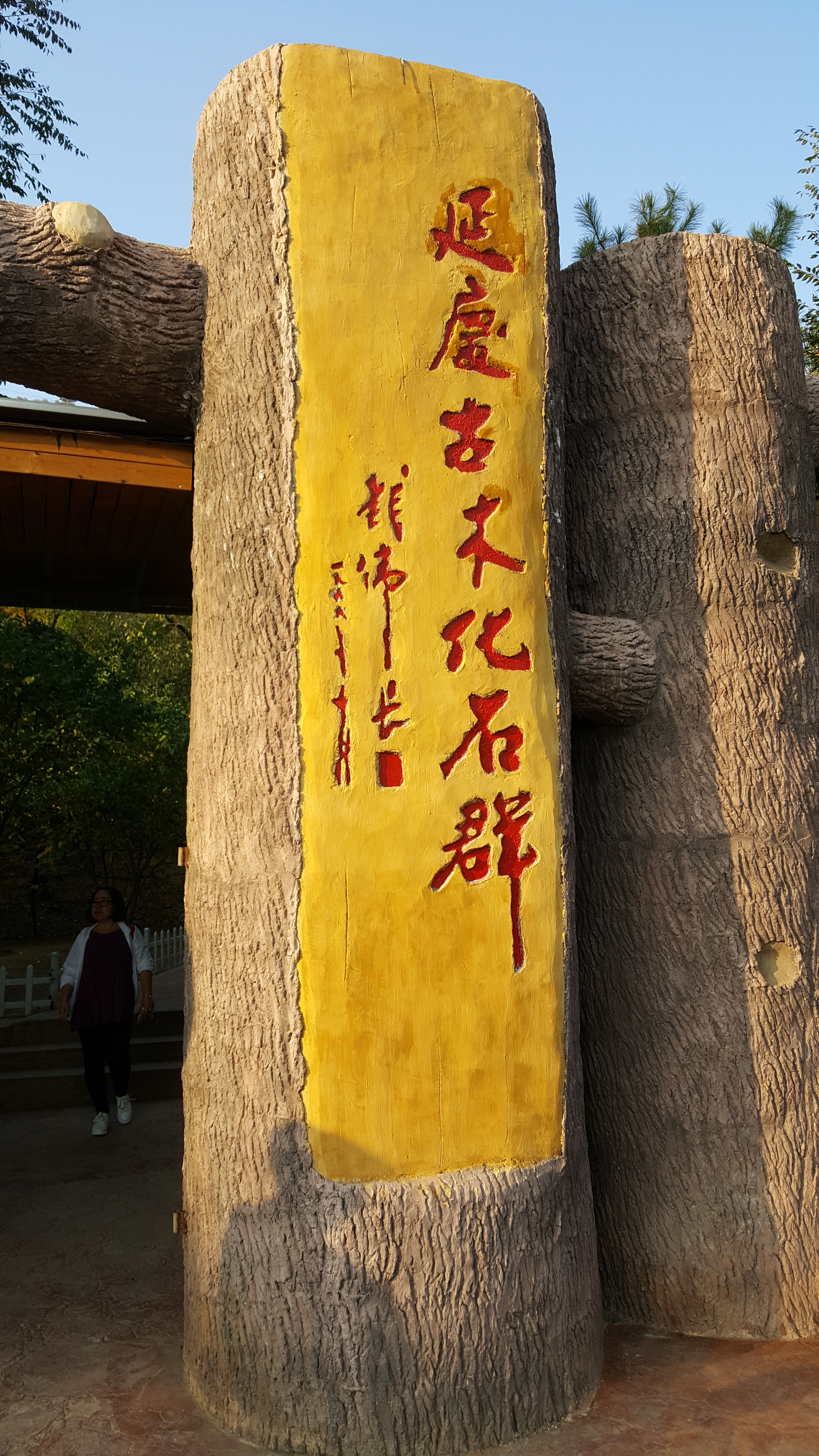 中文（中国大陆）: 延庆硅化木地质公园大门